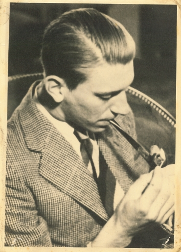 Foto is verstrekt door de naaste familie.